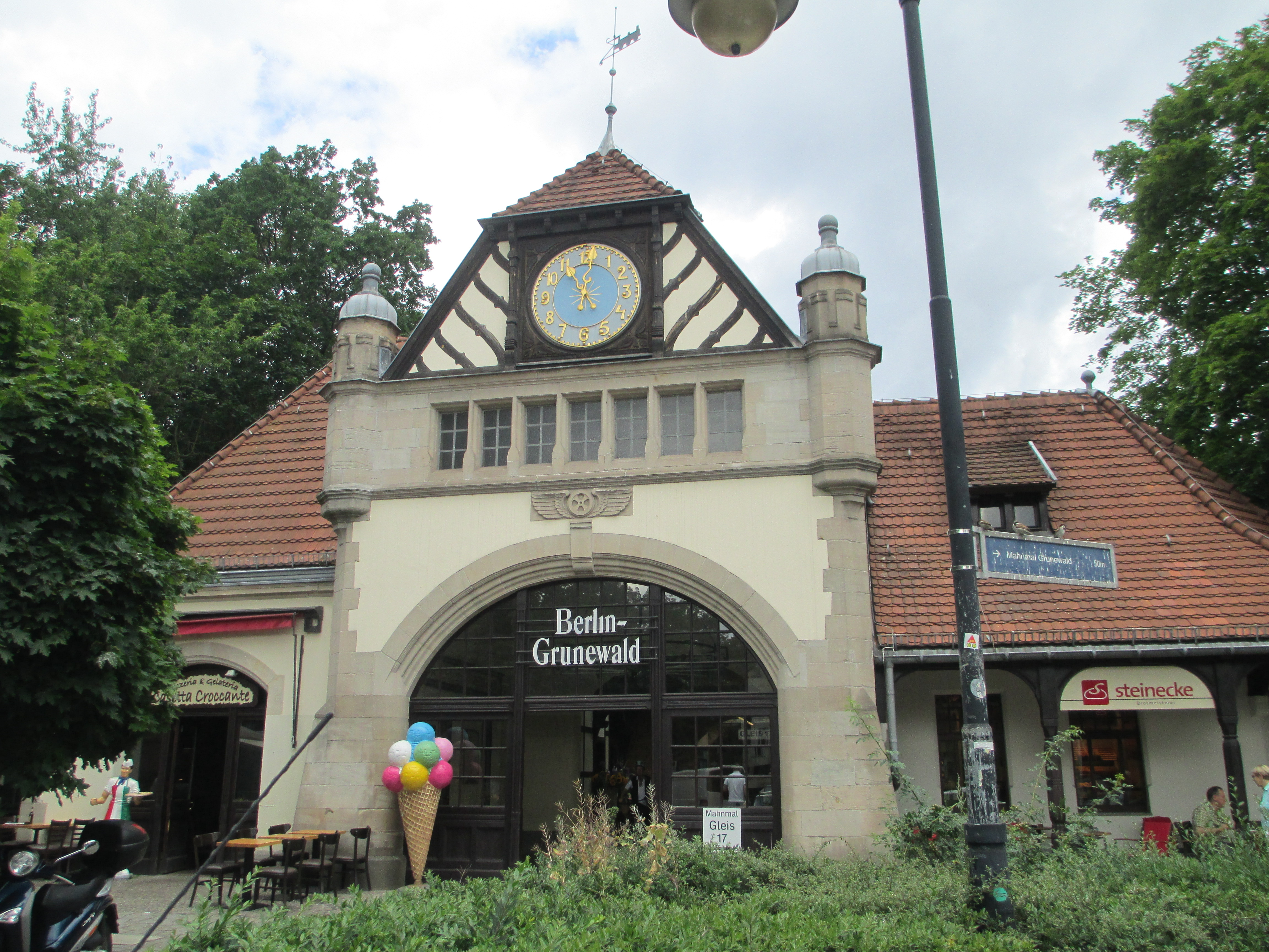 תחנת הרכבת גרונוולד